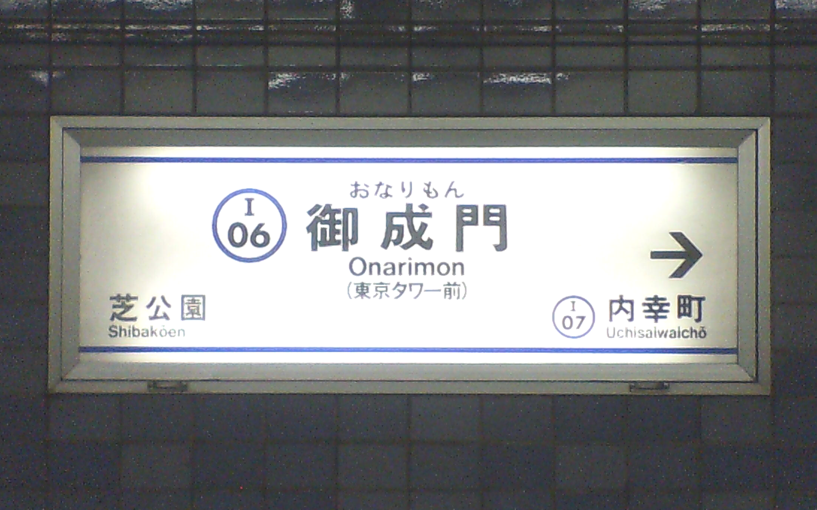 御成門駅 ホーム壁面の駅名標